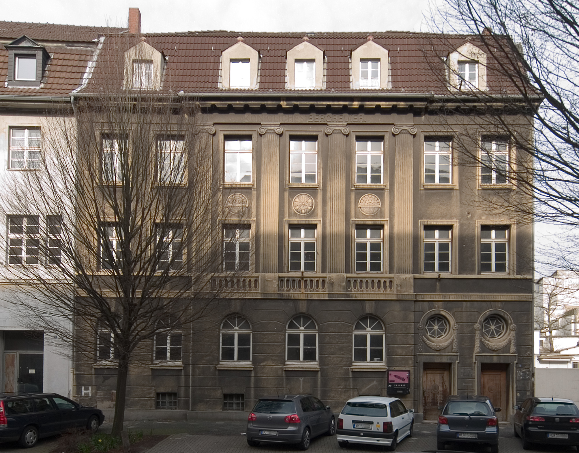 Gebäude 'königliches Bergrevier' in Herne, ehemals der Sitz einer Unterabteilung des Oberbergamtes in Dortmund